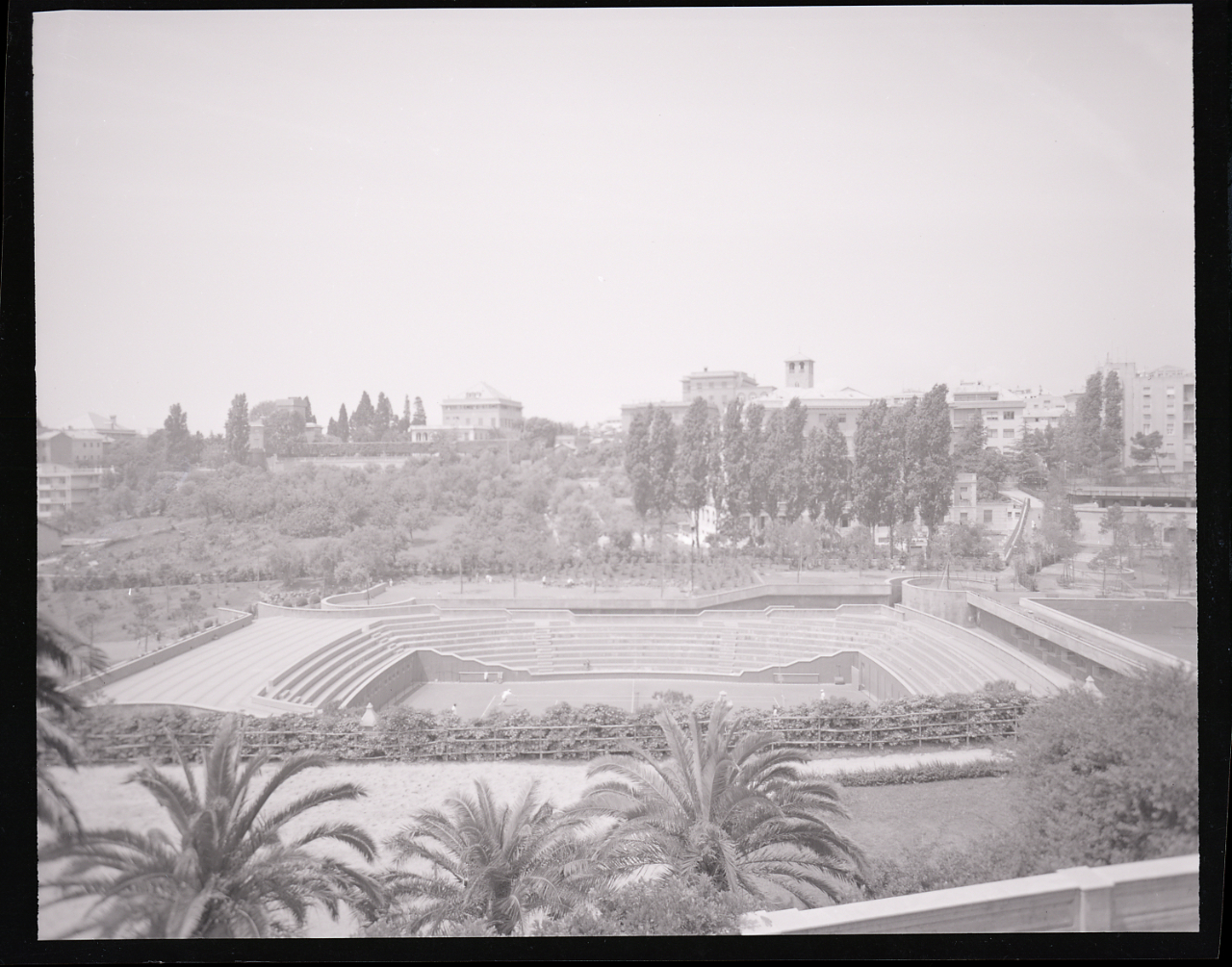 Genova. Tennis Albaro realizzato su progetto dell'architetto Carlo Scarpa. Servizio fotografico : Genova, 1963 / Paolo Monti. - Buste: 2, Fototipi: 3 : Negativo b/n, gelatina bromuro d'argento/ pellicola ; 10x12. - ((Serie costituita da 2 buste contenenti 3 negativi identificati con i nn.: 6190-6191. - Fonte: Rubrica di Paolo Monti: Archivio fino 1-4-1961/ 31-3-1963 (1961-1963), presso Archivio Paolo Monti. - Fonte: Agenda di Paolo Monti: R 1 - Monti/ 1 aprile 1963 - 6 giugno 1964/ 6000-8193 (1964-1964), presso Archivio Paolo Monti